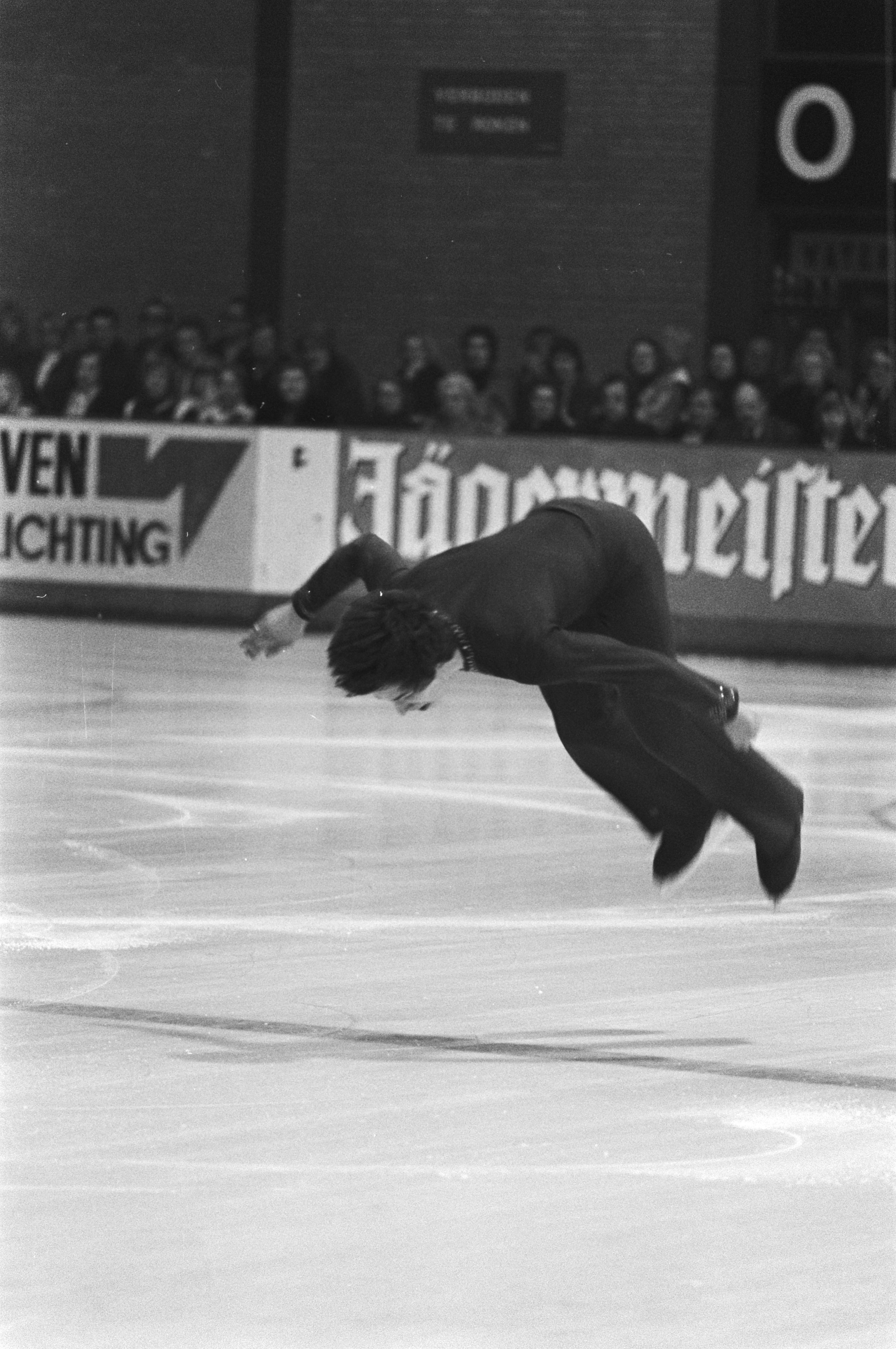 Collectie / Archief : Fotocollectie Anefo Reportage / Serie : [ onbekend ] Beschrijving : Demonstratie internationale top kunstrijden in Edenhal; Amerikaan Terry Kubicka in aktie (koprol) Datum : 16 maart 1976 Locatie : Amsterdam, Noord-Holland Trefwoorden : kunstrijden, sport Persoonsnaam : Kubicka Terry Fotograaf : Peters, Hans / Anefo Auteursrechthebbende : Nationaal Archief Materiaalsoort : Negatief (zwart/wit) Nummer archiefinventaris : bekijk toegang 2.24.01.05 Bestanddeelnummer : 928-4696